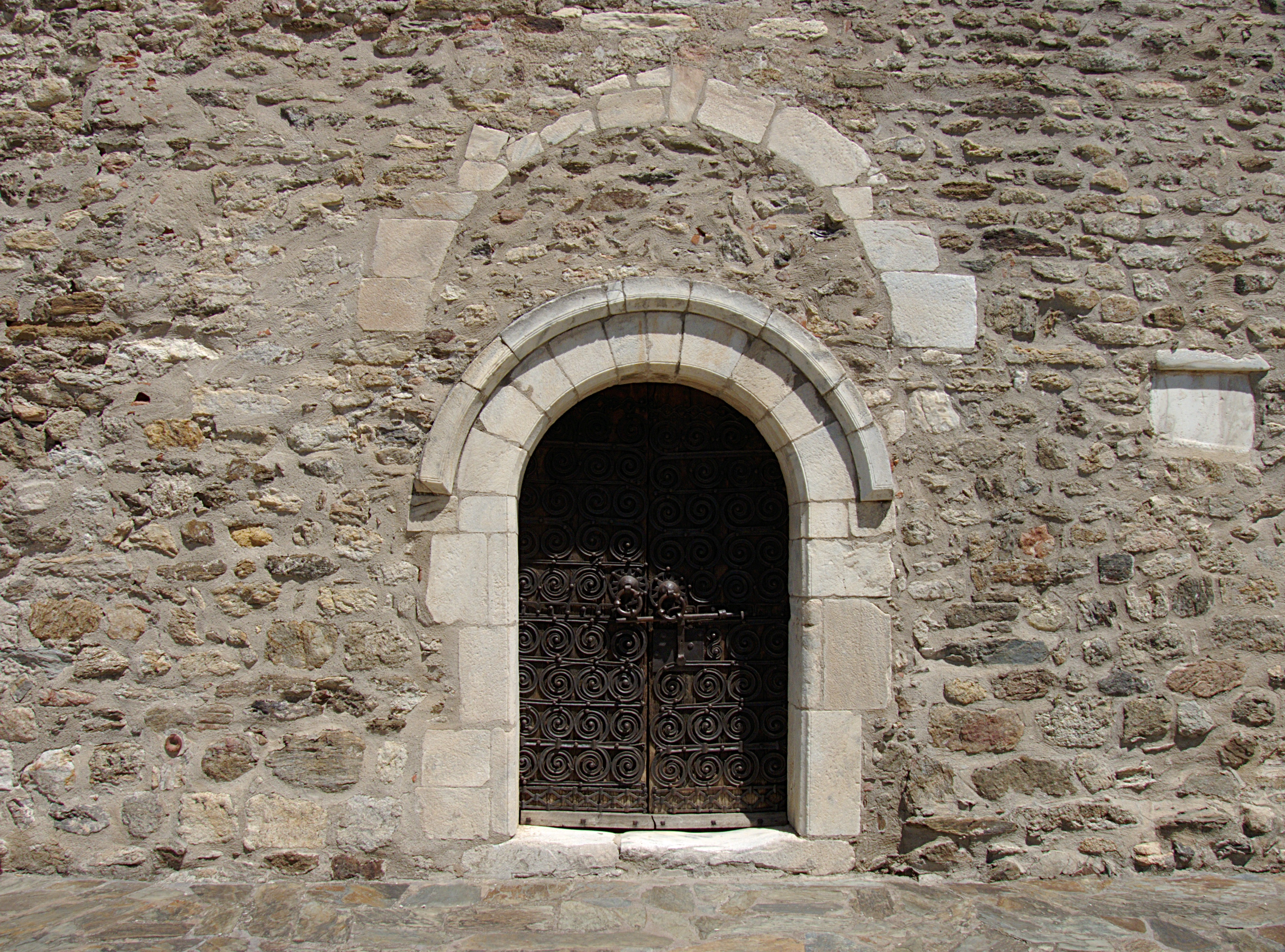 Entrée de l'église Saint-Saturnin (12ème siècle), Montesquieu des Albères (Pyrénées-Orientales, Languedoc-Roussillon, France)